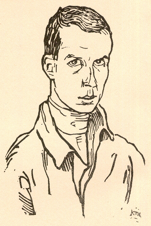 Karl Thylmann, Selbstportrait, Holzschnitt